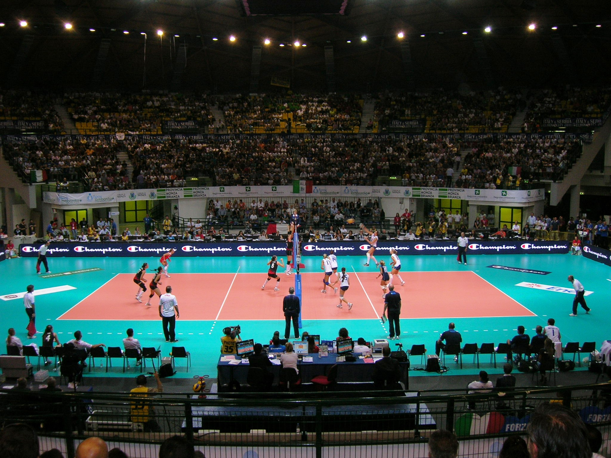 Partita: Italia - Turchia 2-3